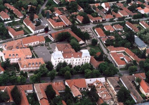 Szegedi Kis István Református Gimnázium, Általános Iskola, Óvoda és Kollégium. Az un. 'utcaképi védelem' miatt (Petőfi u. 2-30) műemlék azonosító -1292. - Cím: Békés, Petőfi Sándor u. 11